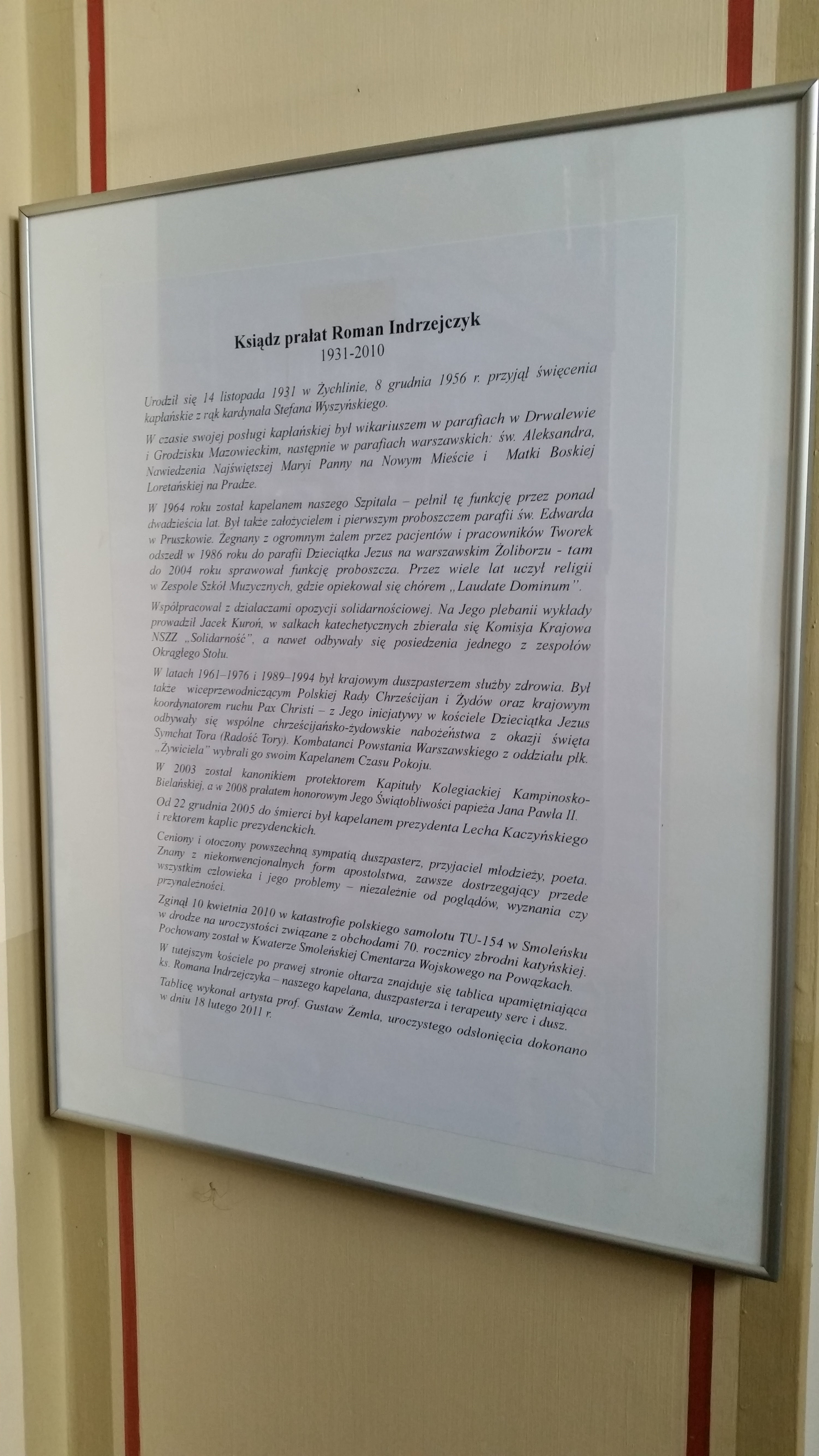 Tabliczka informacyjna upamiętniająca księdza Romana Indrzejczyka, który był duszpasterzem w Kościele Przemienienia Pańskiego w Pruszkowie oraz proboszczem parafii św. Edwarda w Pruszkowie